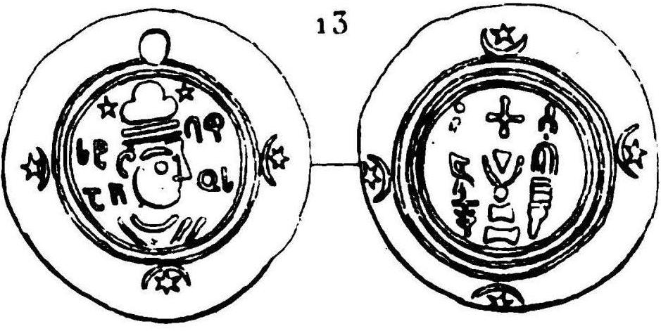 Victor Langlois. Stéphanos I. PL II. No.13